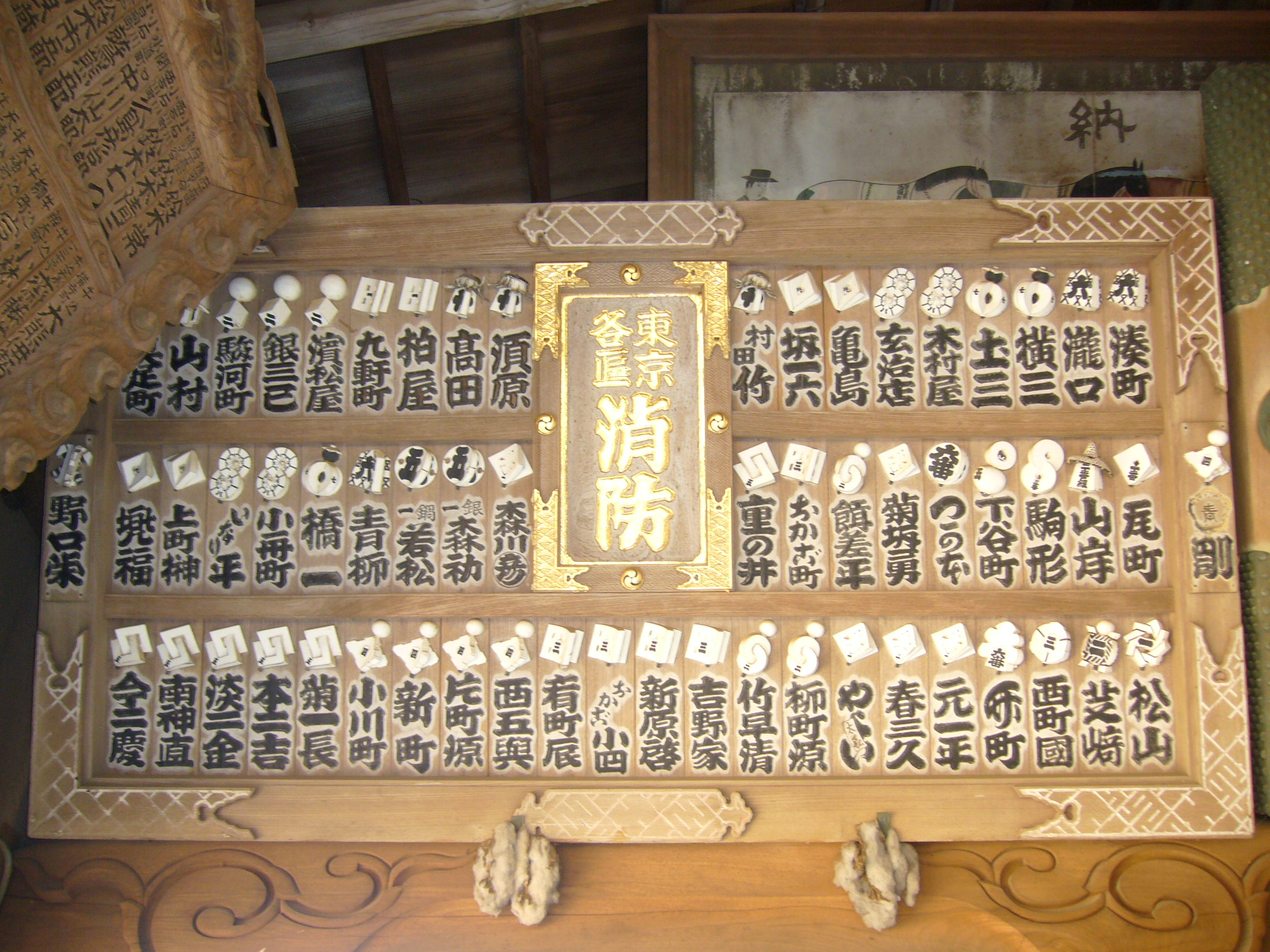 yamakura daijin shrine frame2,katori-city,japan